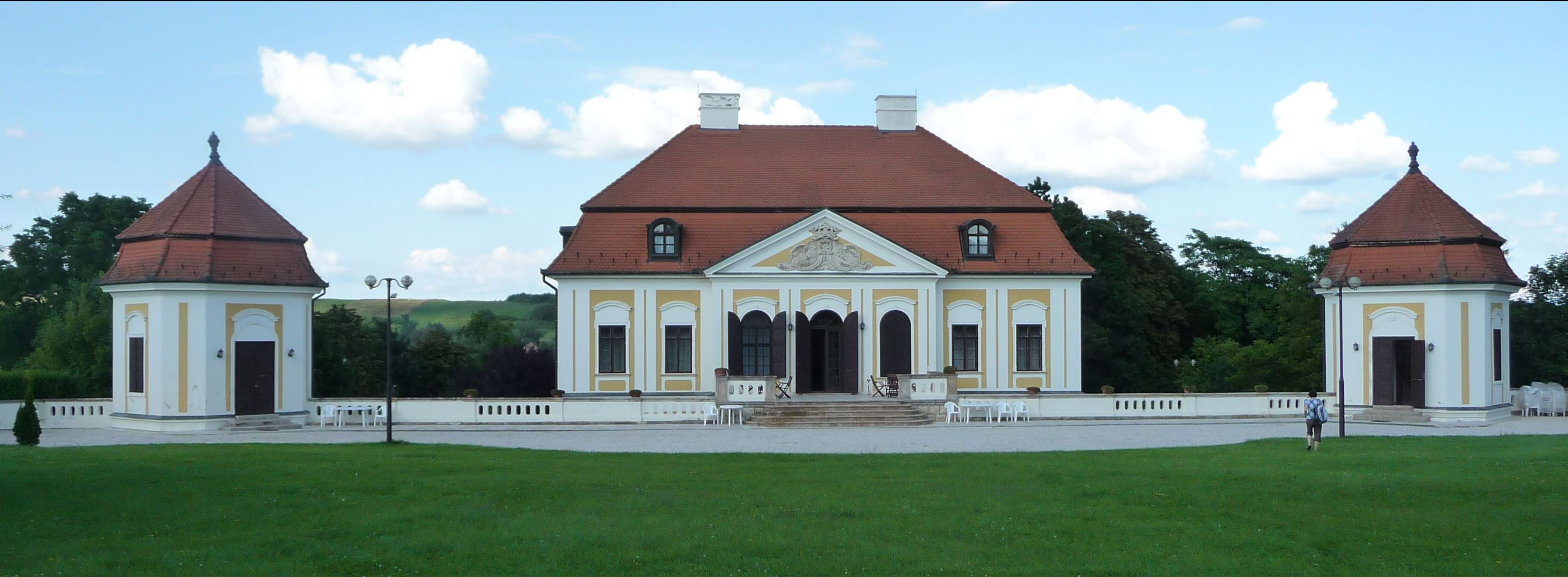 Szentmiklóssy-Kubinyi kastély délnyugati homlokzata, Erdőtarcsa